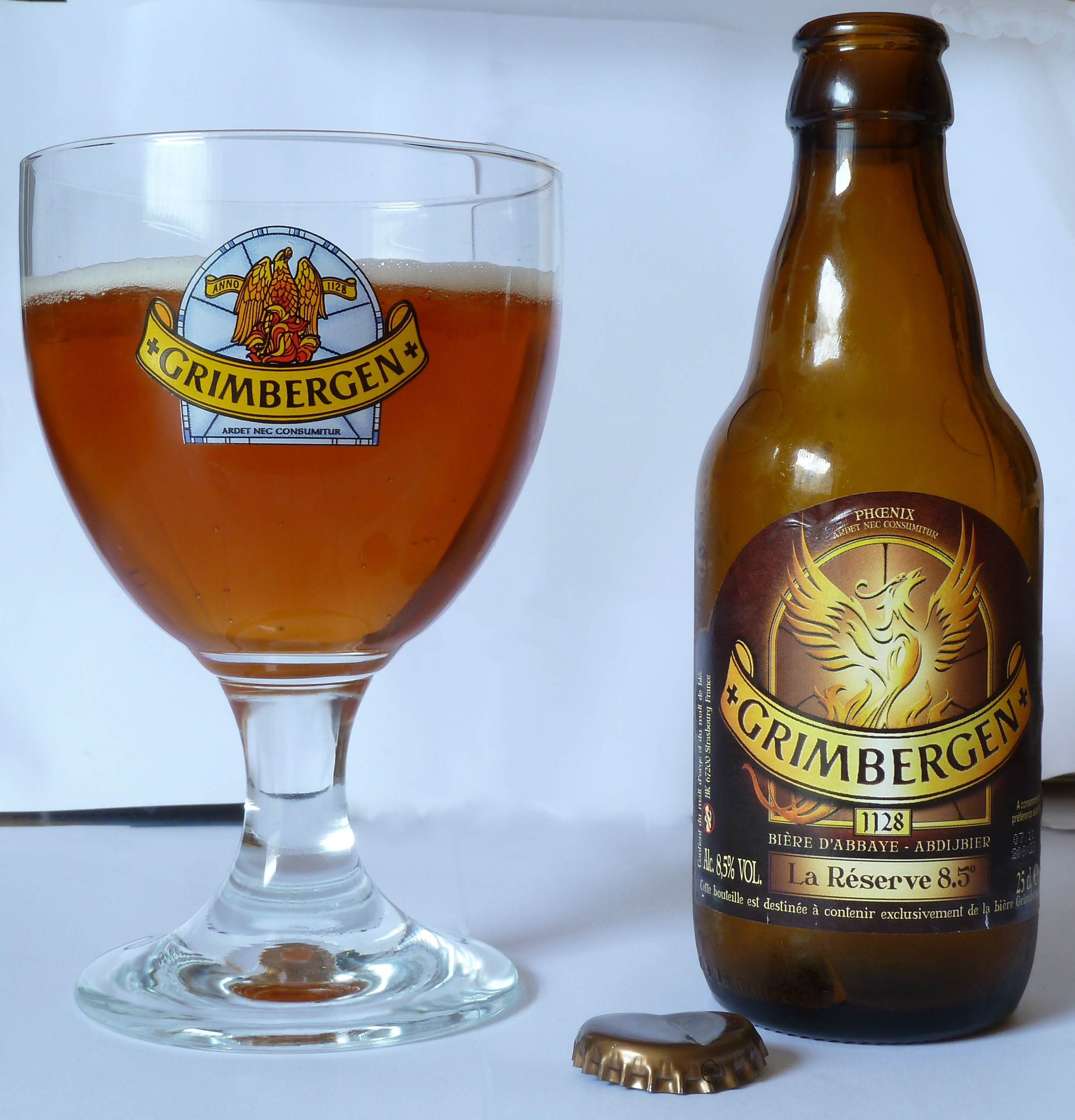 Eine Flasche Grimbergen La Réserve 8,5 mit Kelchglas.